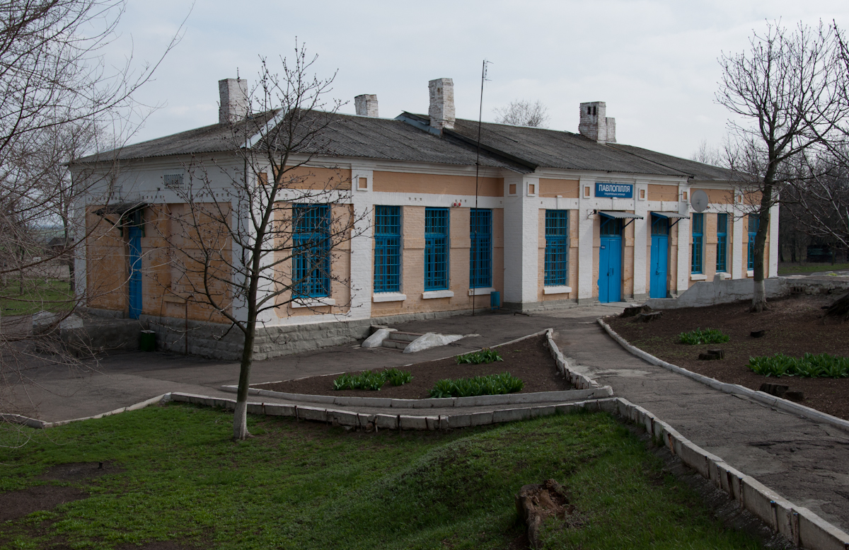 Вокзал